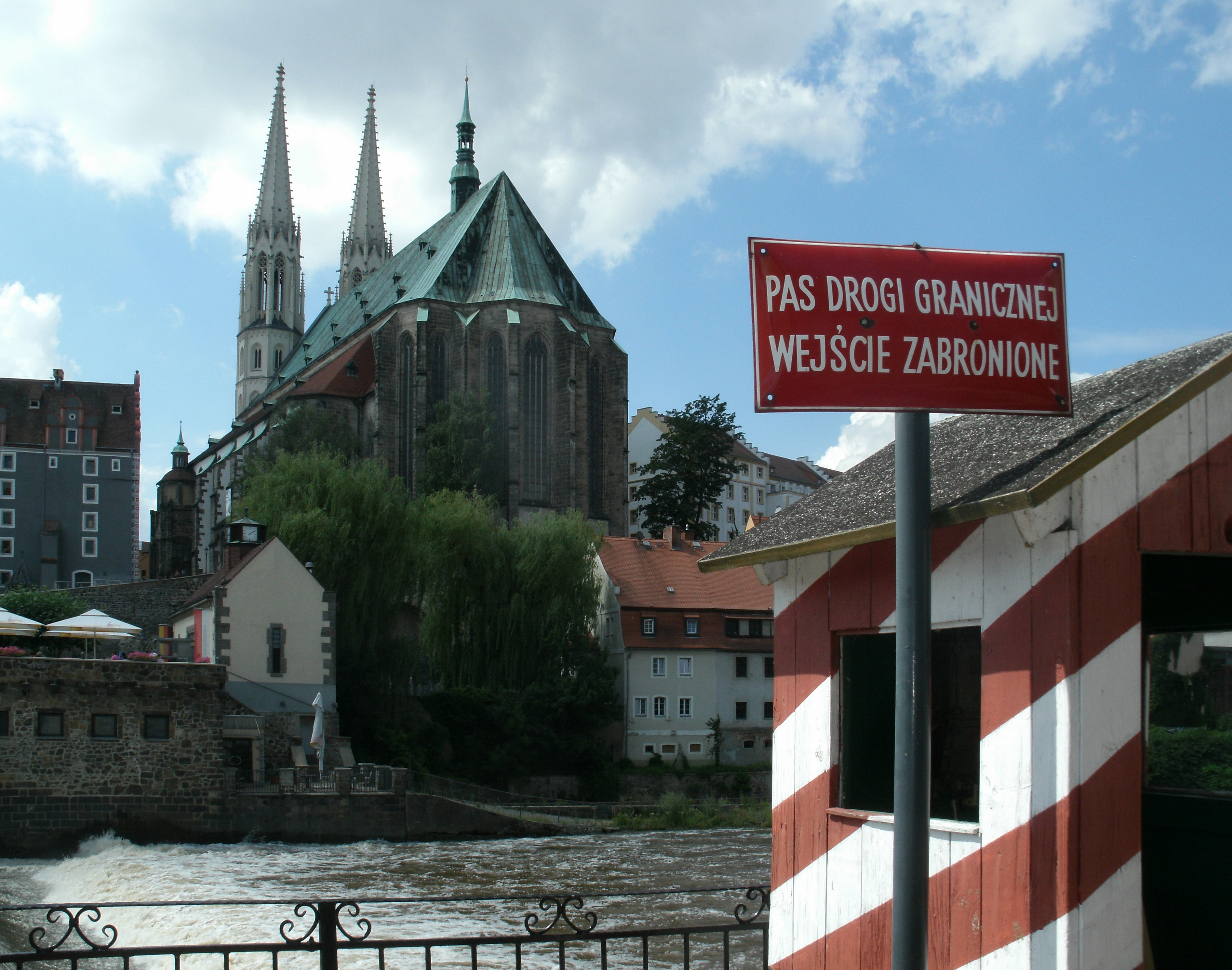 Altes Grenzschild in Zgorzelec auf polnischer Seite, übersetzt: „Grenzstraße Einreise verboten“.